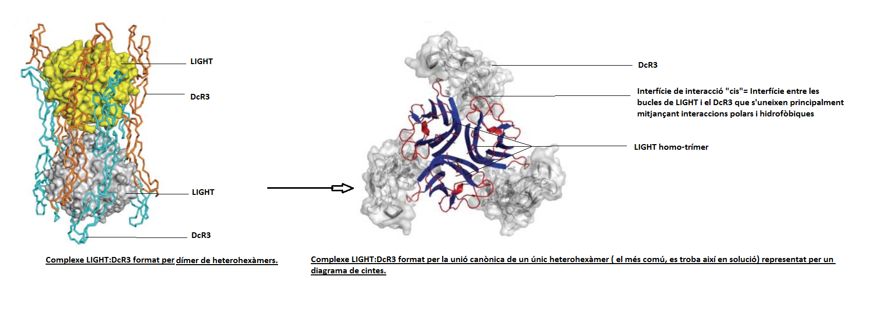 A l'esquerra es pot veure un dímer de heterohexàmers que forman el complexe cristalí DcR3-LIGHT. No obstant, el més usual és que aquest complexe estigui format per un únic heterohexàmer que és representat per la imatge de la dreta. DcR3-LIGHT té estequiometria 3:3 i es manté gràcies a las interaccions que tenen lloc a la itnerficie"cis". Malgrat que aquesta imatge ha estat editada i completada, prové de l'article " Mechanistic basis for functional promiscuity in the TNF and TNF receptors superfamilies: structure of the LIGHT: DcR3 assembly". Ha estat editat a partir de les imatges de l'article " Mechanistic basis for functional promiscuity in the TNF and TNF receptors superfamilies: structure of the LIGHT: DcR3 assembly".